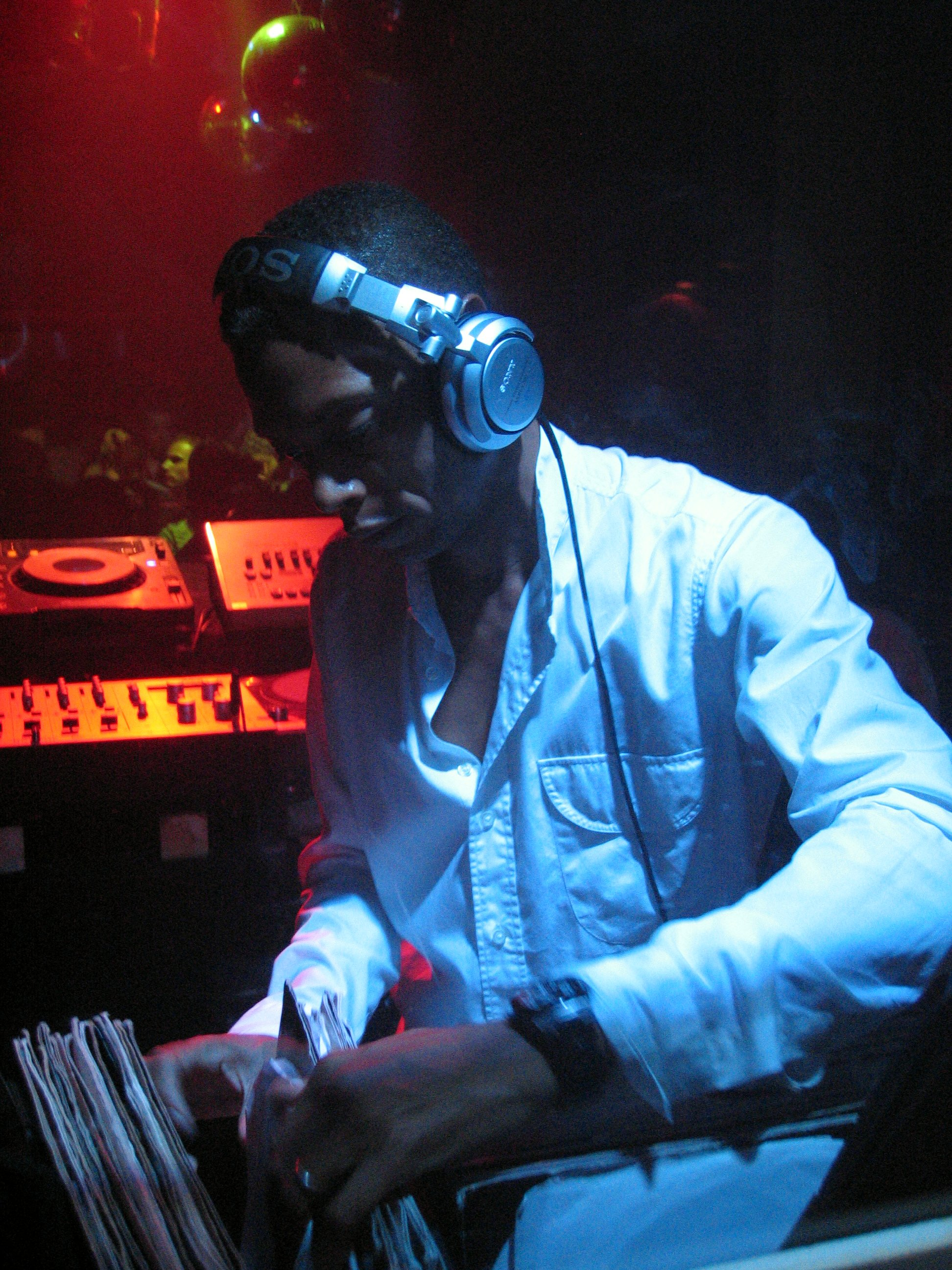 DJ Jeff Mills (2006 in Munich)